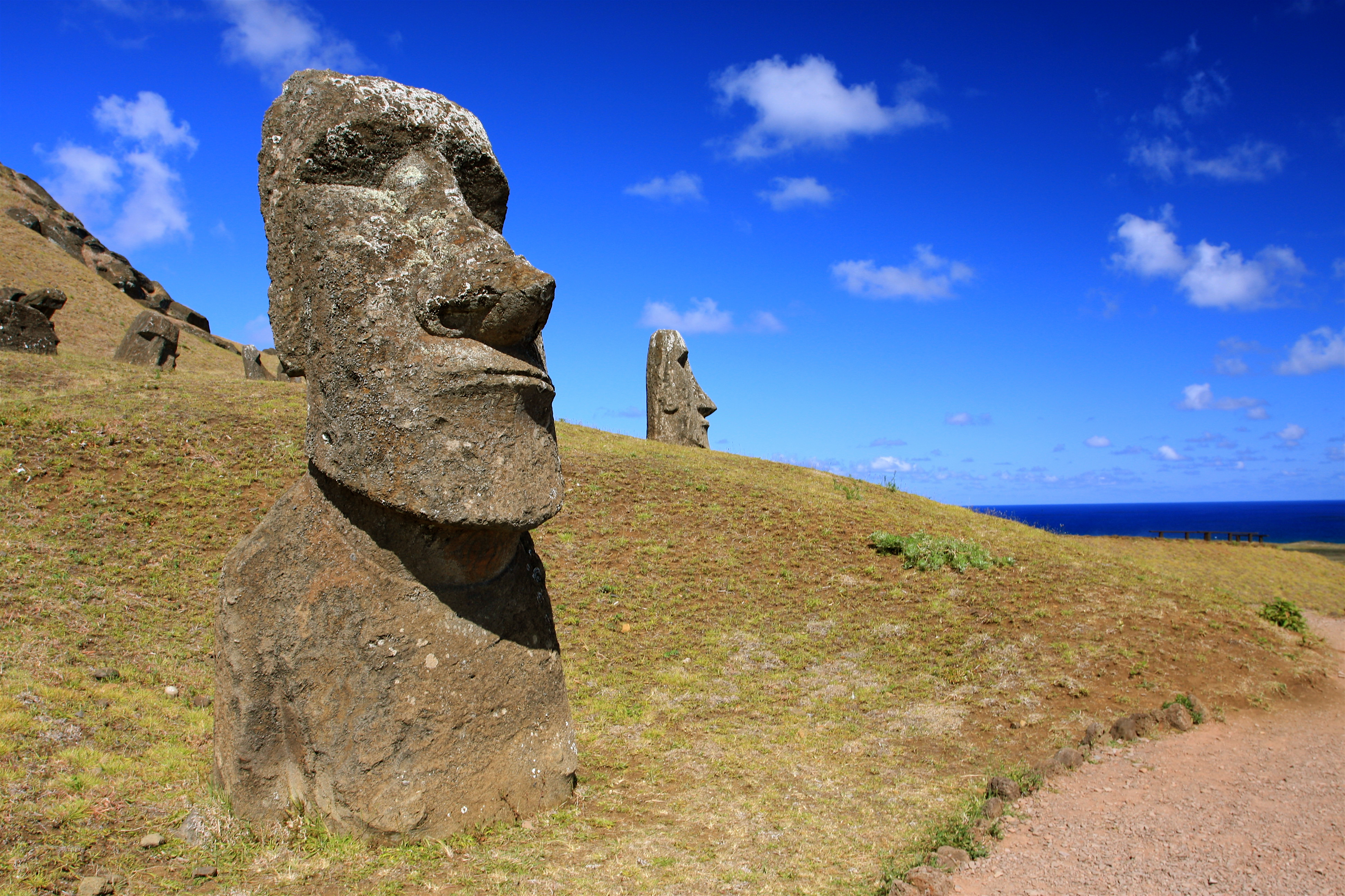 Moai at Rano Raraku - Easter Island